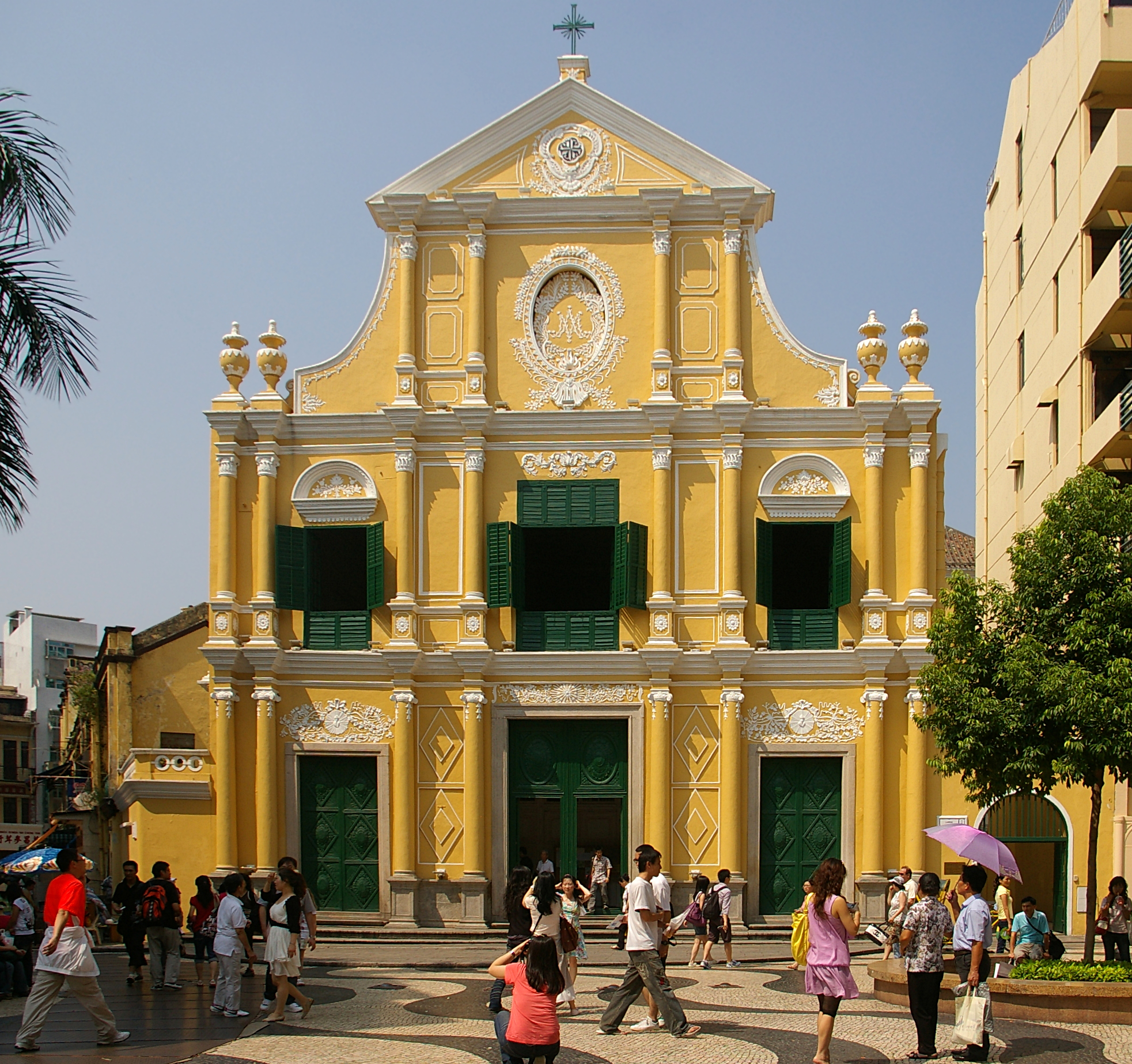 Kościół św. Dominika w Makau